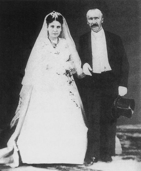 Sophia e Heinrich Schliemann, matrimonio ad Atene, 1869